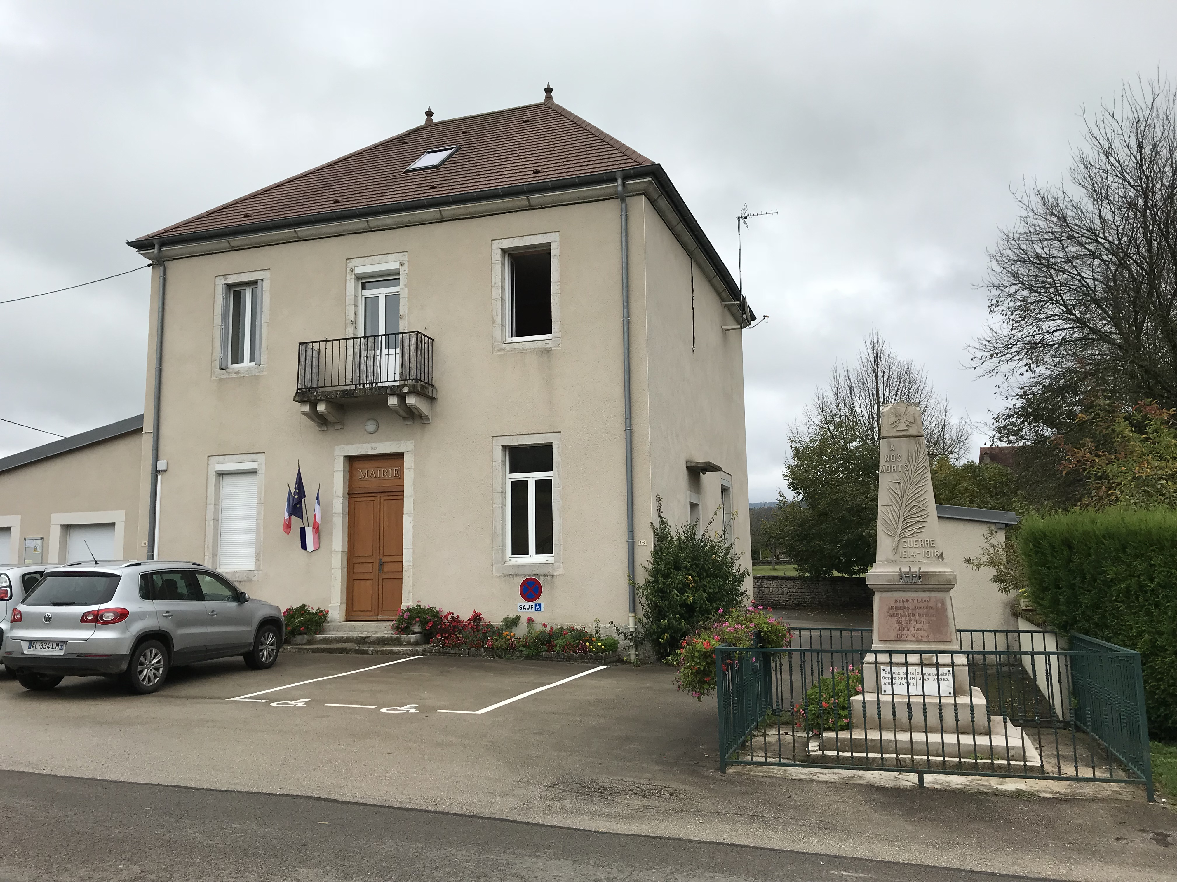 Chambéria (Jura, France) en octobre 2017.